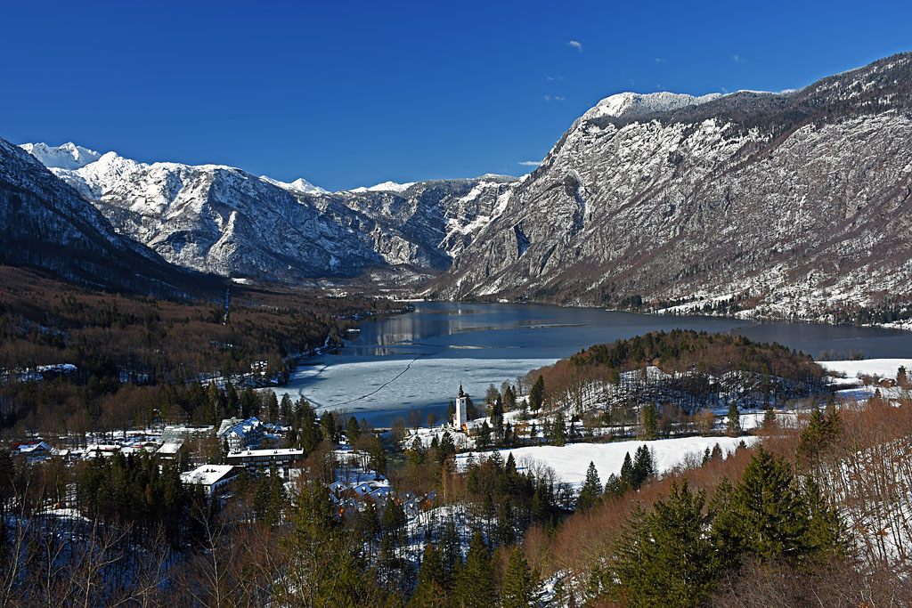 Bohinjsko jezero s peči